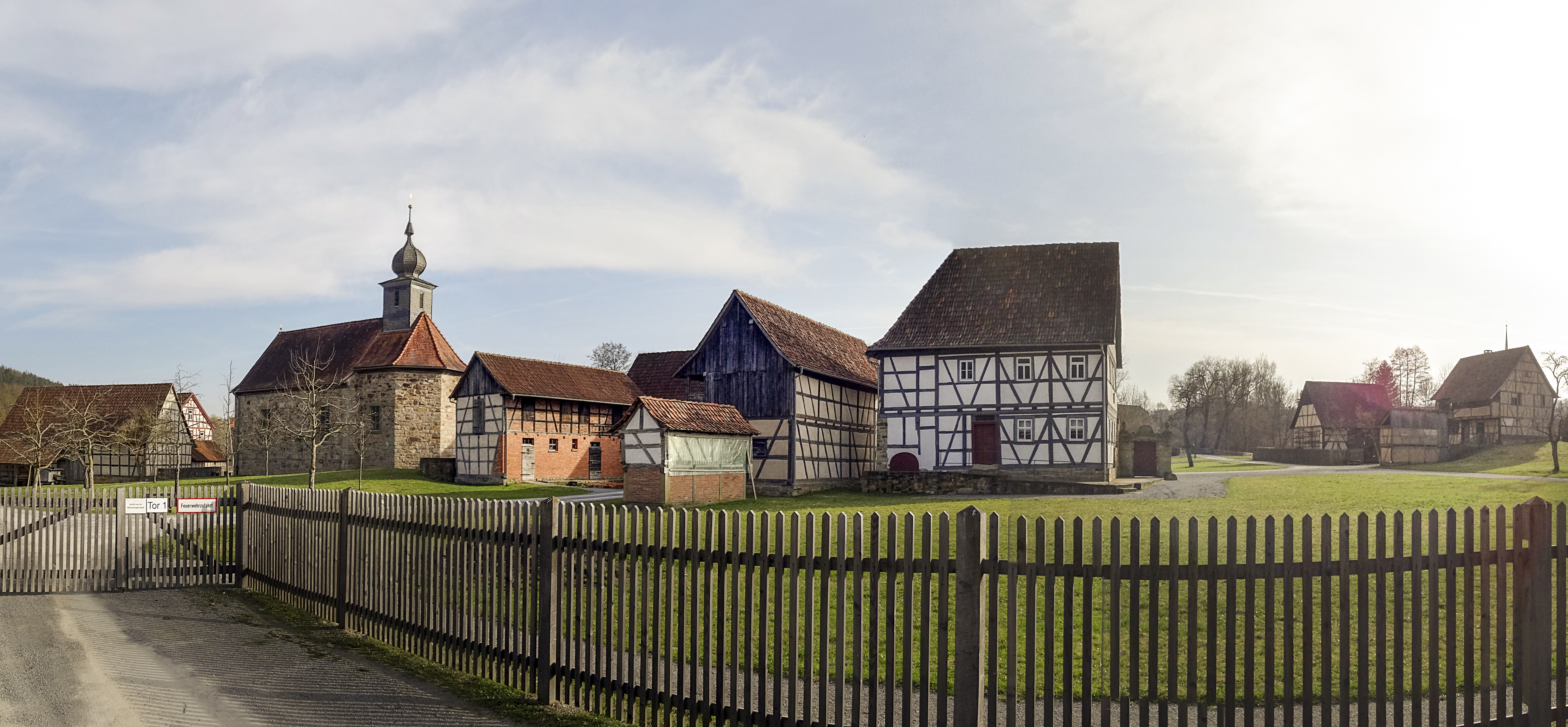 Fränkisches Freilandmuseum Fladungen